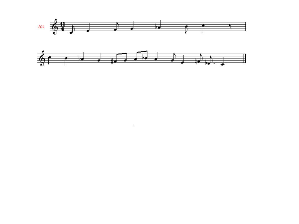 Raga Ramkali in Bhairav That (scale). Zman 09:16, 13 May 2006 (UTC)